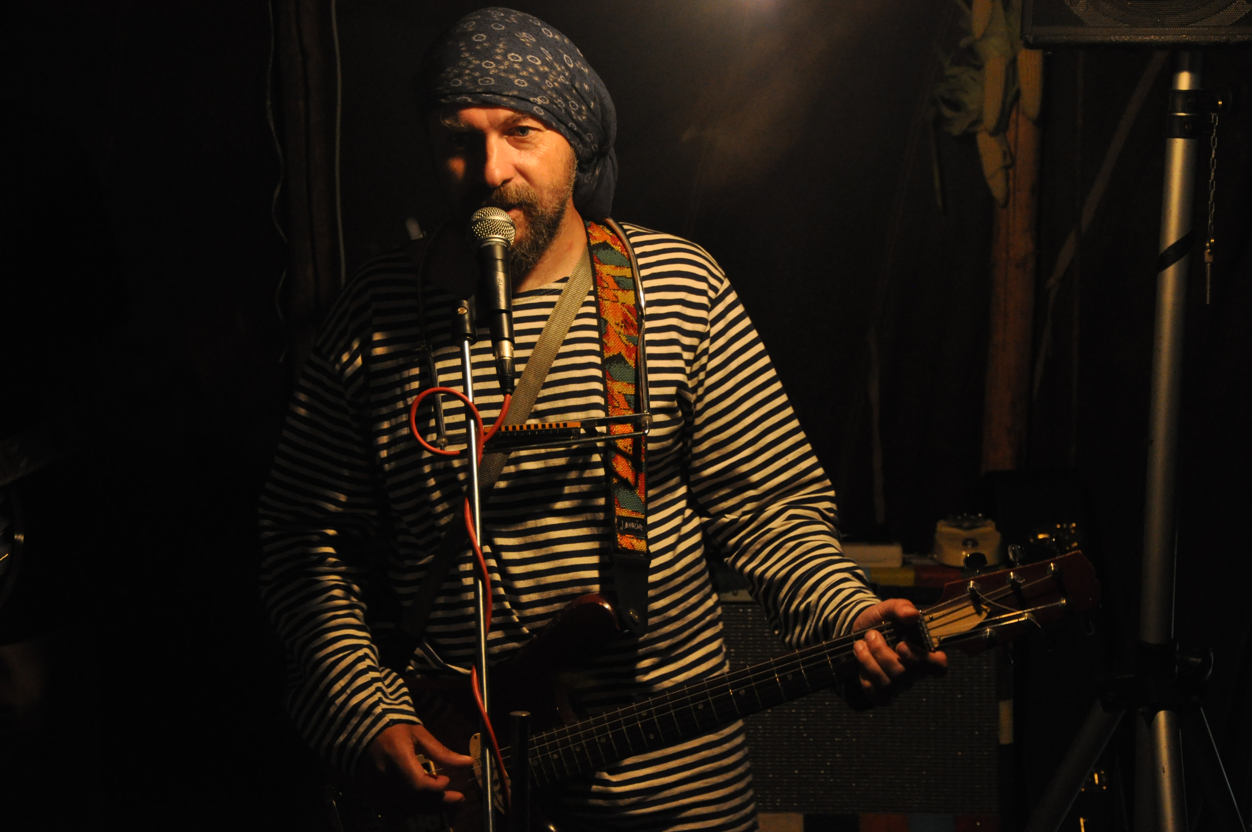 Původní Bureš na festivalu Otevřeno Jimramov 2009